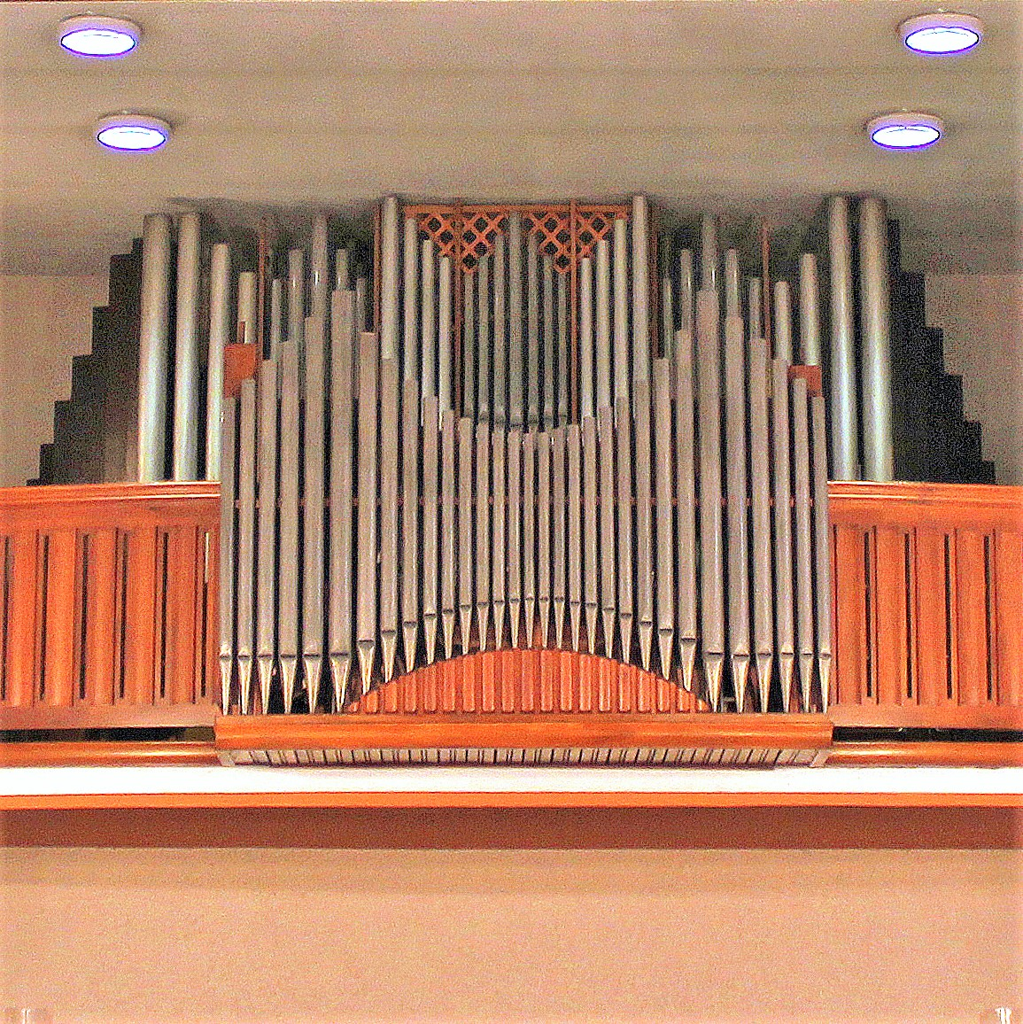 Blick ins Innere der evangelischen Christuskirche in Rohrbach (Saar)